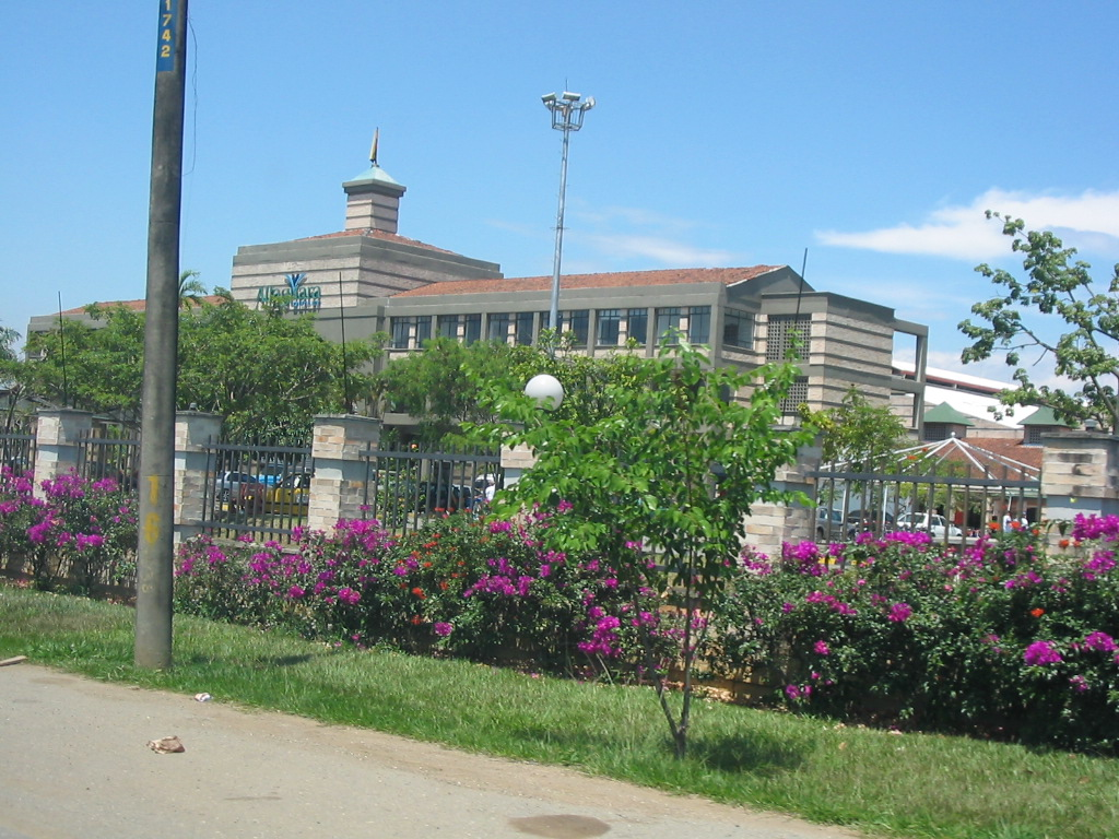 Centro Comercial Alfaguara